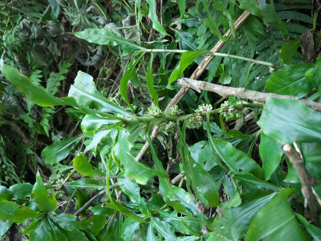 2020/01/02 沖縄本島：Okinawa Island, Japan